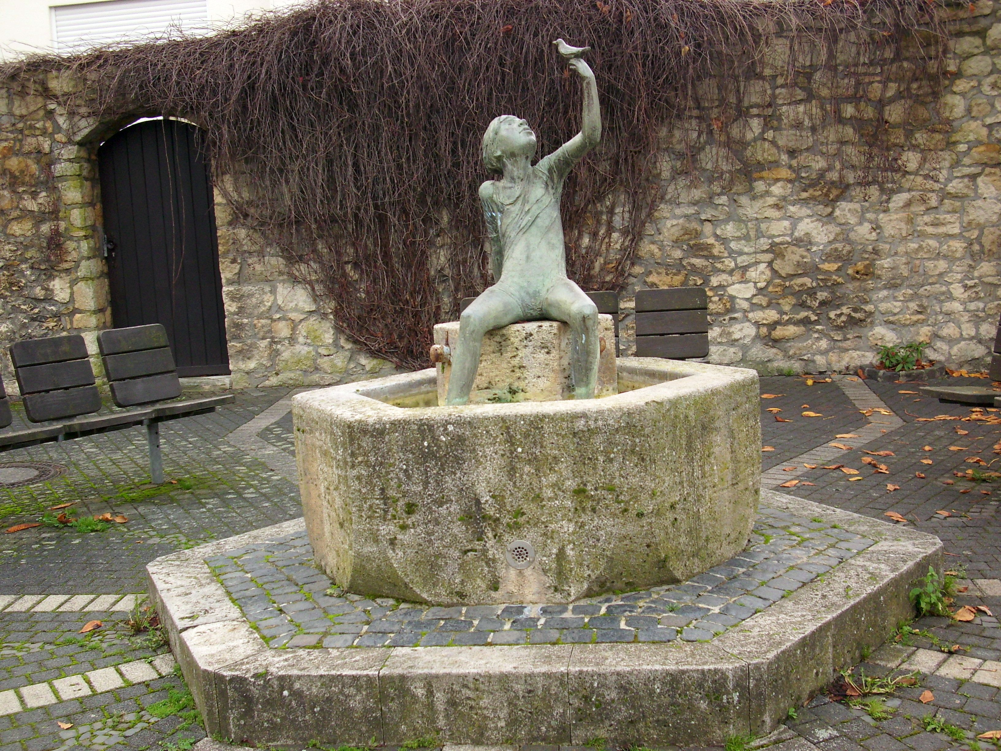 Weitgehend unversehrt überlieferte kleinbäuerlich geprägte Baustruktur des Ortskern in seiner Ausdehnung im frühen 19. Jahrhundert mit Zwei-, Drei- und Vierseithöfen. Hier der Dorfplatz mit „Lerchenbub“-Brunnen von Reinhold Petermann.